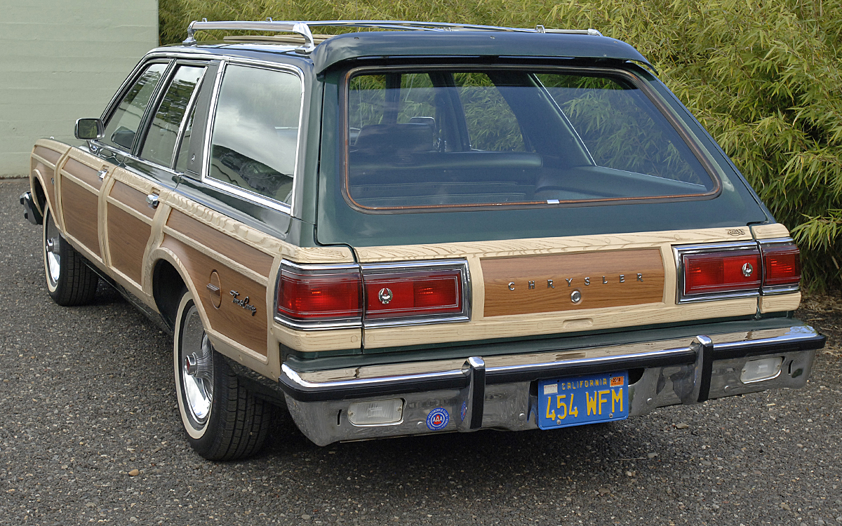 1978 Chrysler LeBaron Town & Country